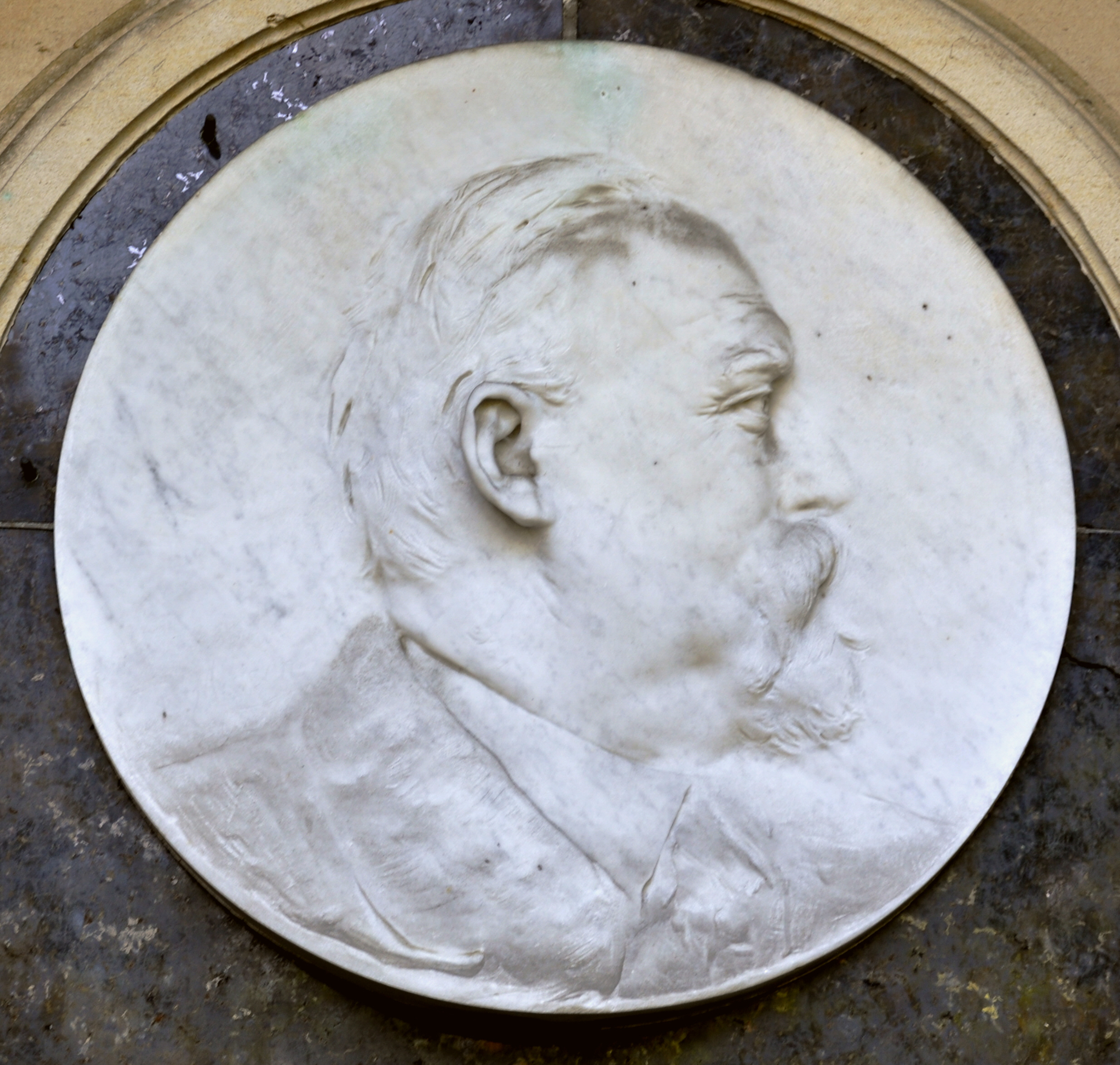 Pfullendorf, Friedhof – Grabmal der Familie Heilig, Detail